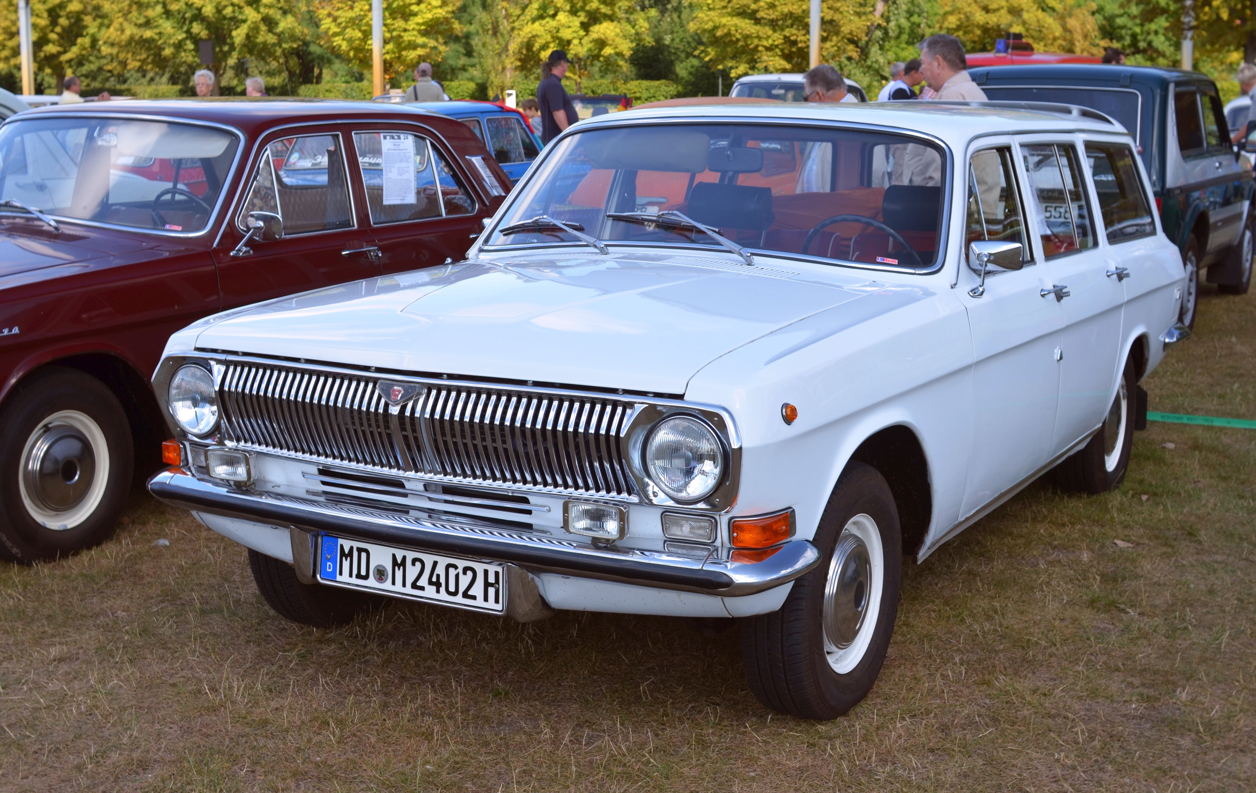 Wolga